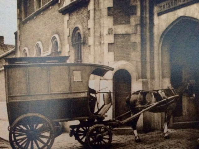 hiermee werden de geëxecuteerden van de gevangenis naar de executieplaats gebracht.